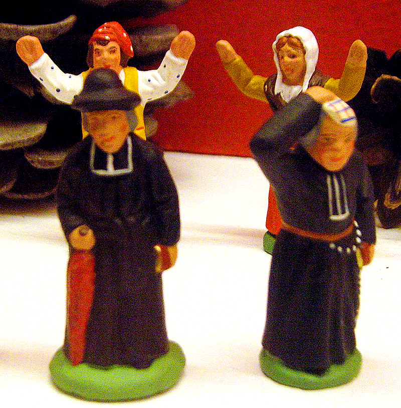 Curés de la crèche